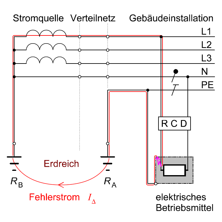 Fehlerschutz im TT-System, bei der im Fehlerfall die automatische Abschaltung der Stromversorgung durch eine Fehlerstrom-Schutzeinrichtung (RCD) erfolgt.